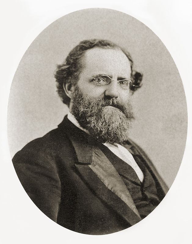 Portrait Rudolph Garrigue